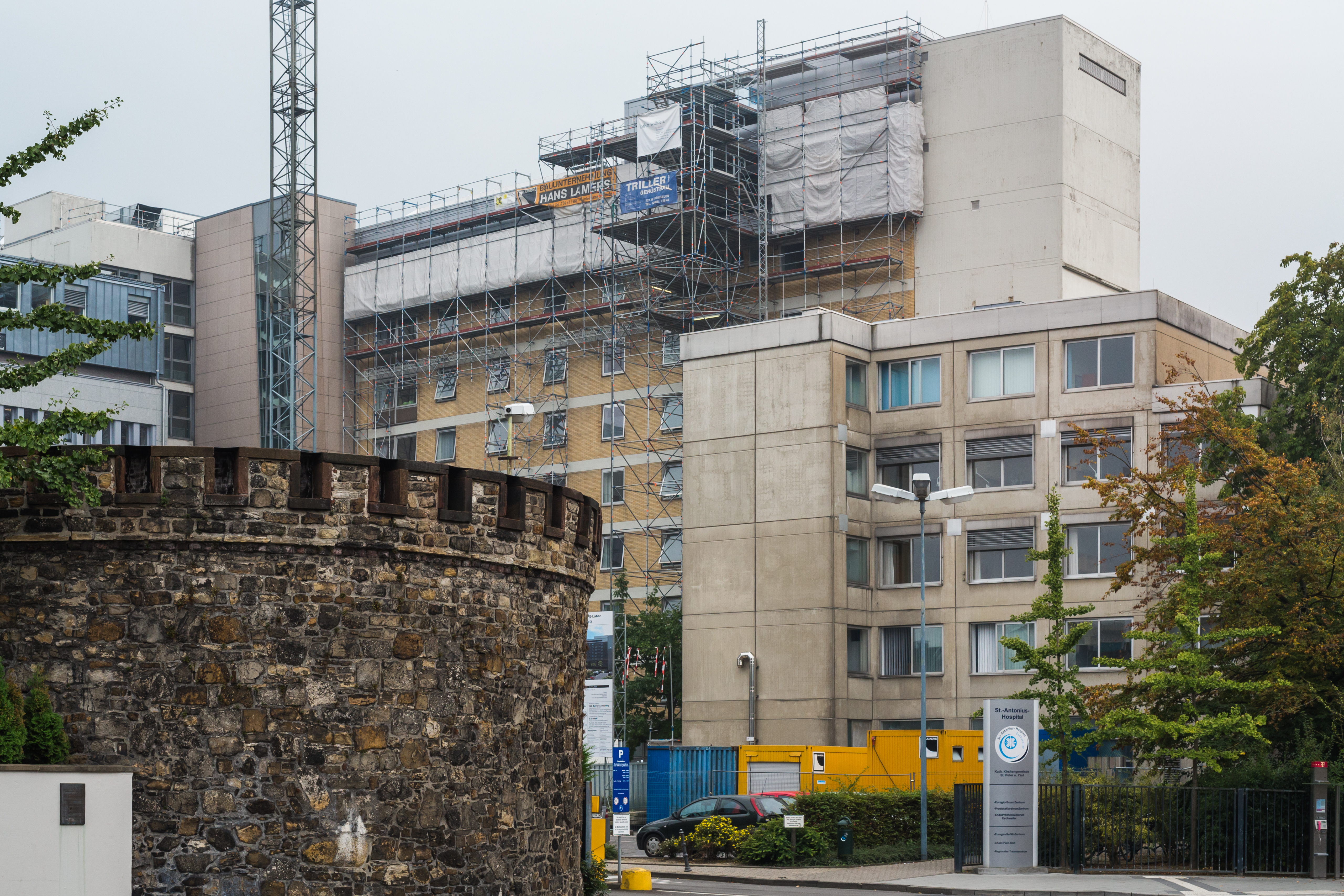 Aussenaufnahme des St. Antonius Hospitals in Eschweiler (September 2014). Gut zu sehen sind die Gerüste, die für die Umbau- und Renovierungsarbeiten des Hauses benötigt werden - der Kran im ersten Drittel des Bildes ist leider abgeschnitten. Im vorderen Bildteil (links unten) ist noch ein Rest der ehemaligen Burg Eschweiler zu erkennen.